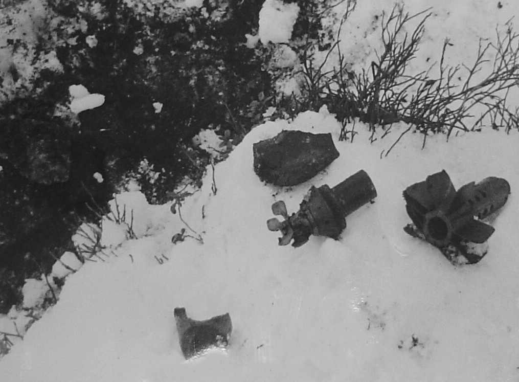 Bombsplitter efter blindgångaren vid Lillsjön i Nacka